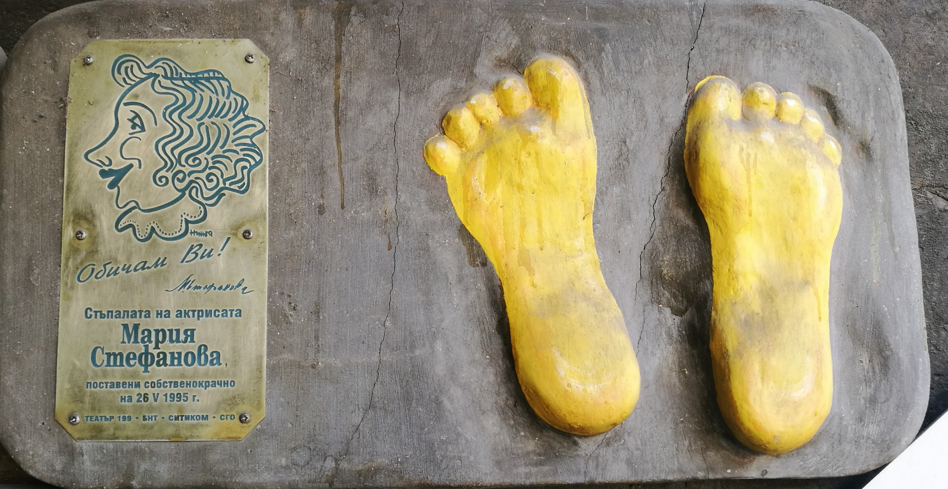 Стената на славата пред Театър 199 - пано с отпечатъци, послание и шарж на Мария Стефанова.